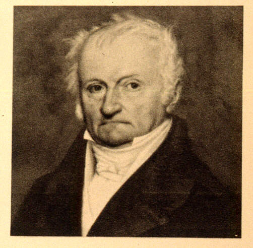 portrait de Martin-Guillaume Biennais